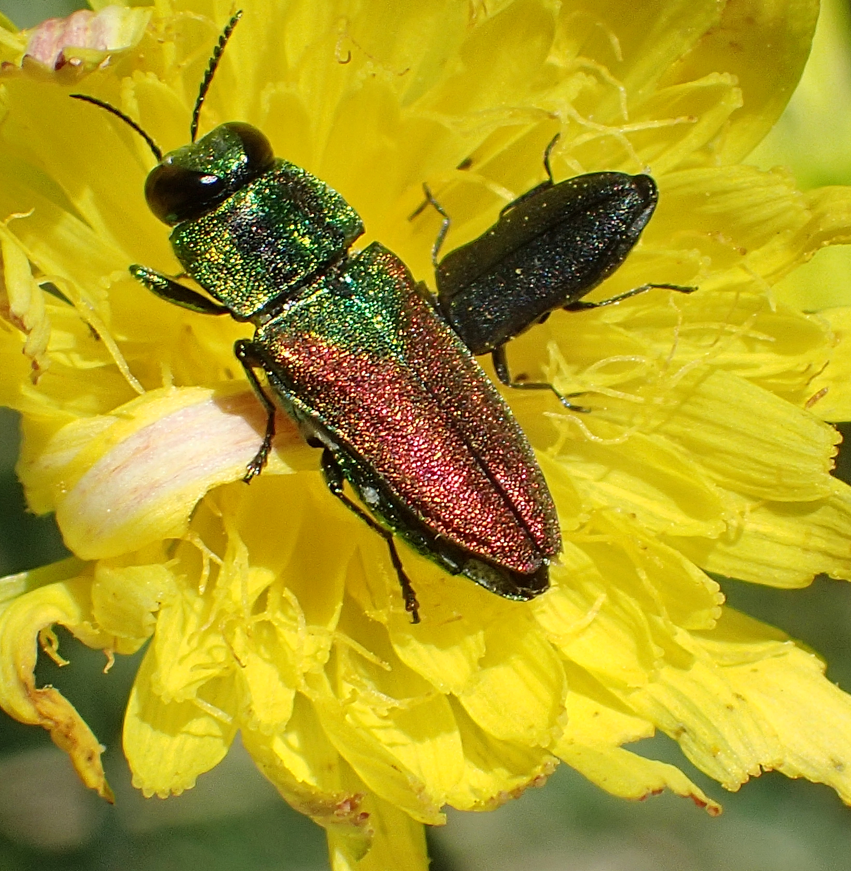 Anthaxia passerinii aus Griechenland, Peloponnes, Mystras; Männchen